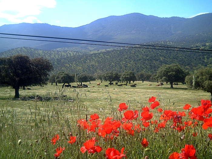 Valle Alcudia paraje de La Vera